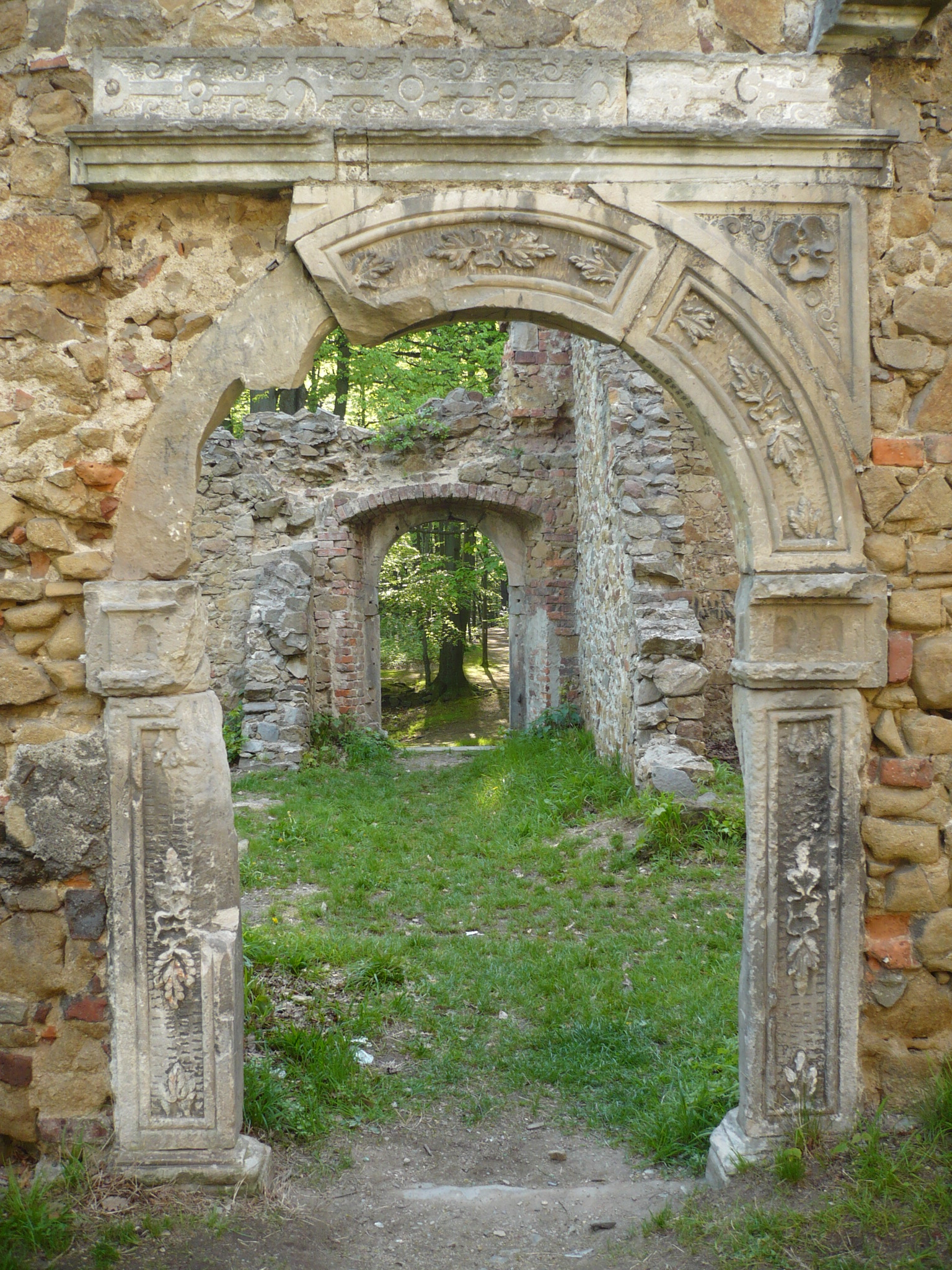 Stary Książ